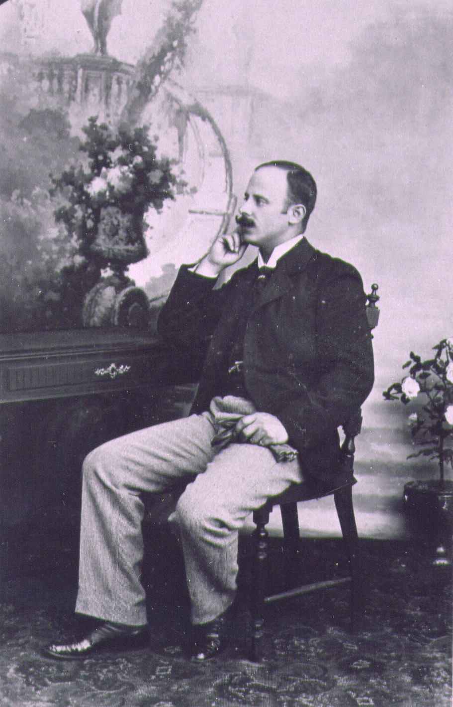 fotografia de Jose Benedito Hidalgo de Vilhena da sua própia autoria, tirada no seu estúdio fotográfico em Santiago do Cacem